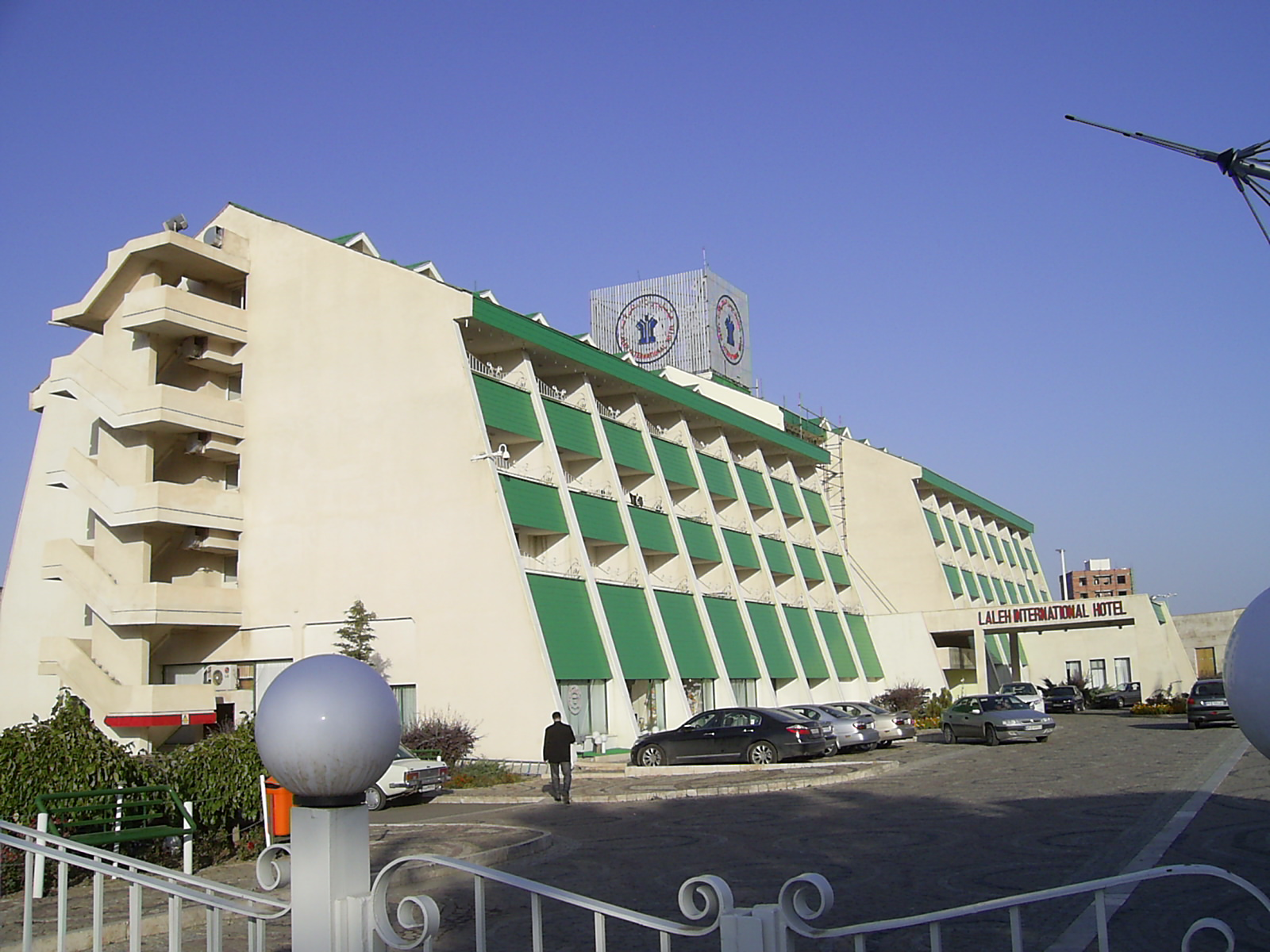 سرعین